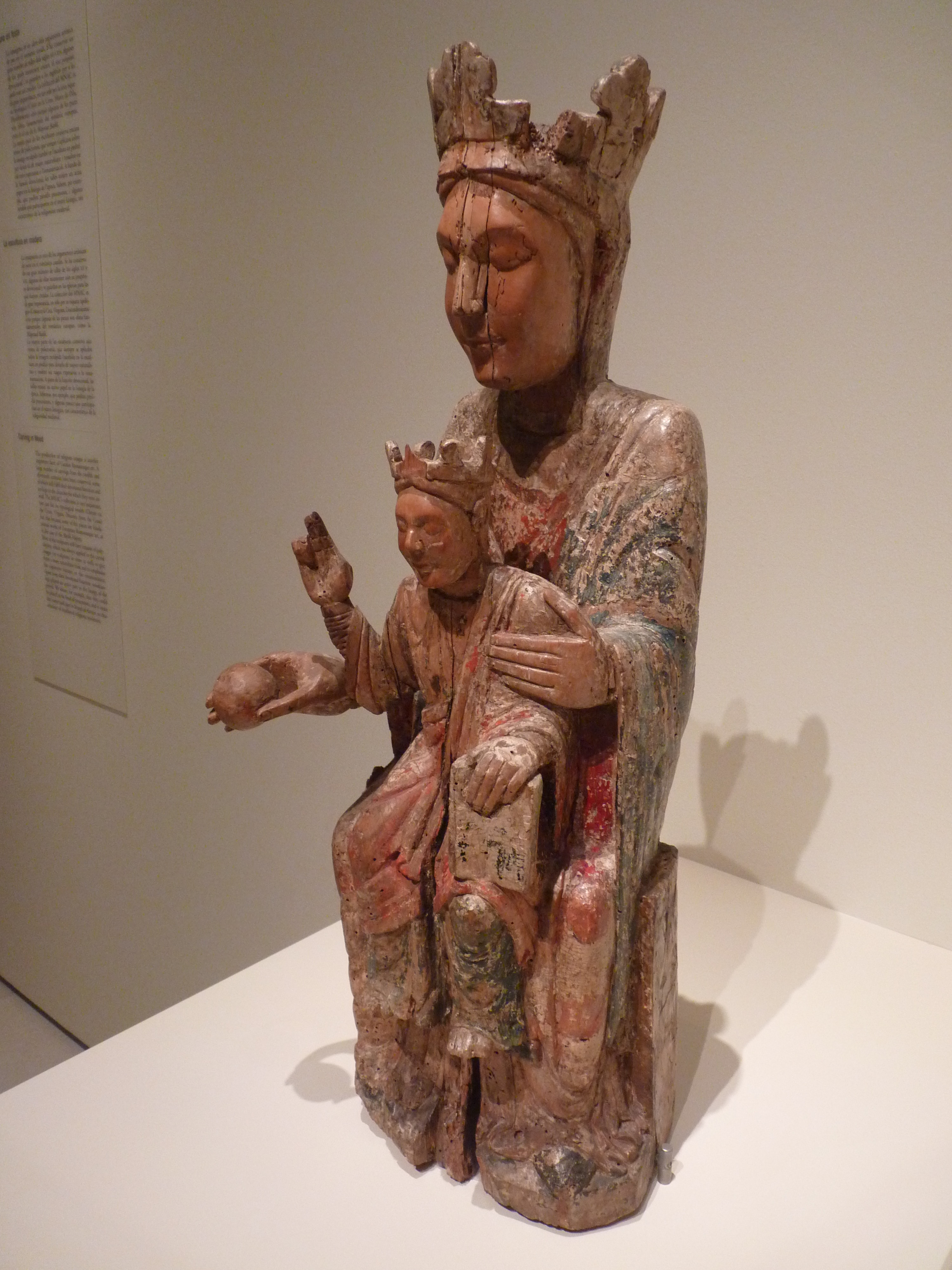 Mare de Déu. ANÒNIM. Cap a 1200